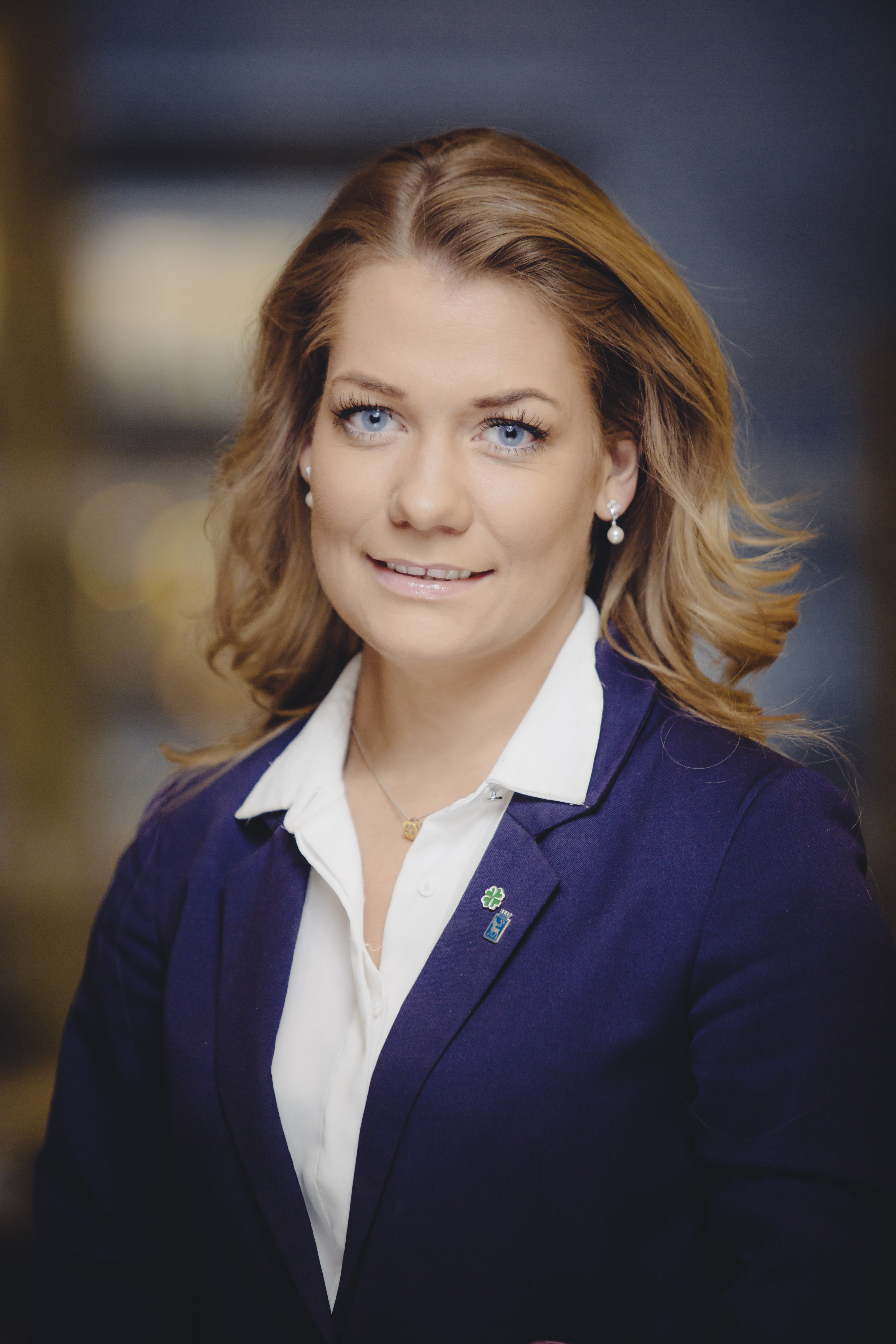 Sandra Borch. Tromsø kommune. Foto: Marius Fiskum /